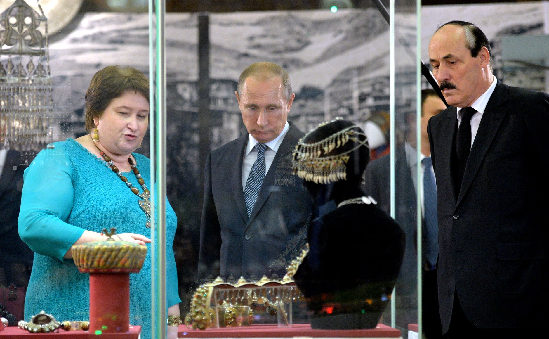 Президент России Владимир Путин, в сопровождении главы Республики Дагестан, посещает выставку, посвящённую 2000-летию Дербента в Государственном историческом музее